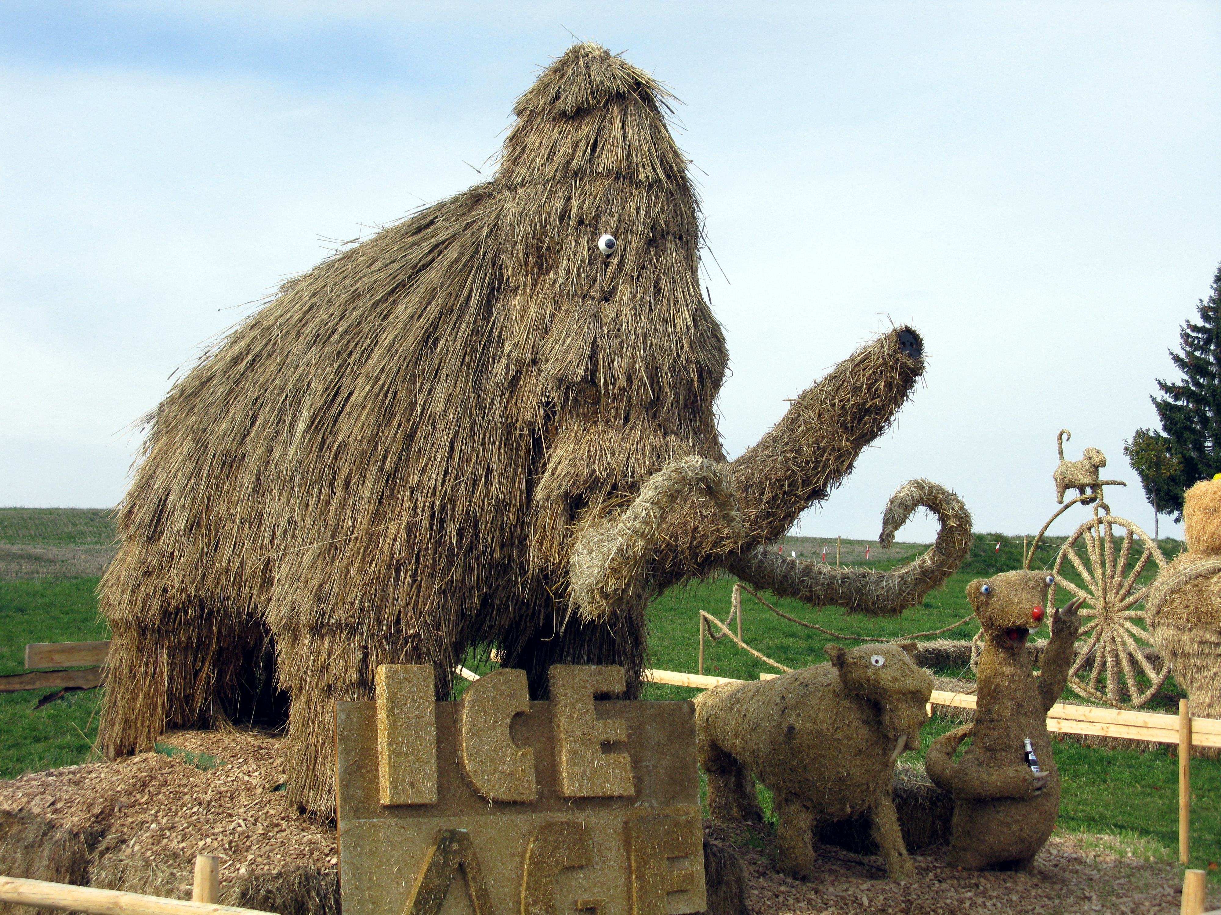 Strohskulpturen in Höchenschwand